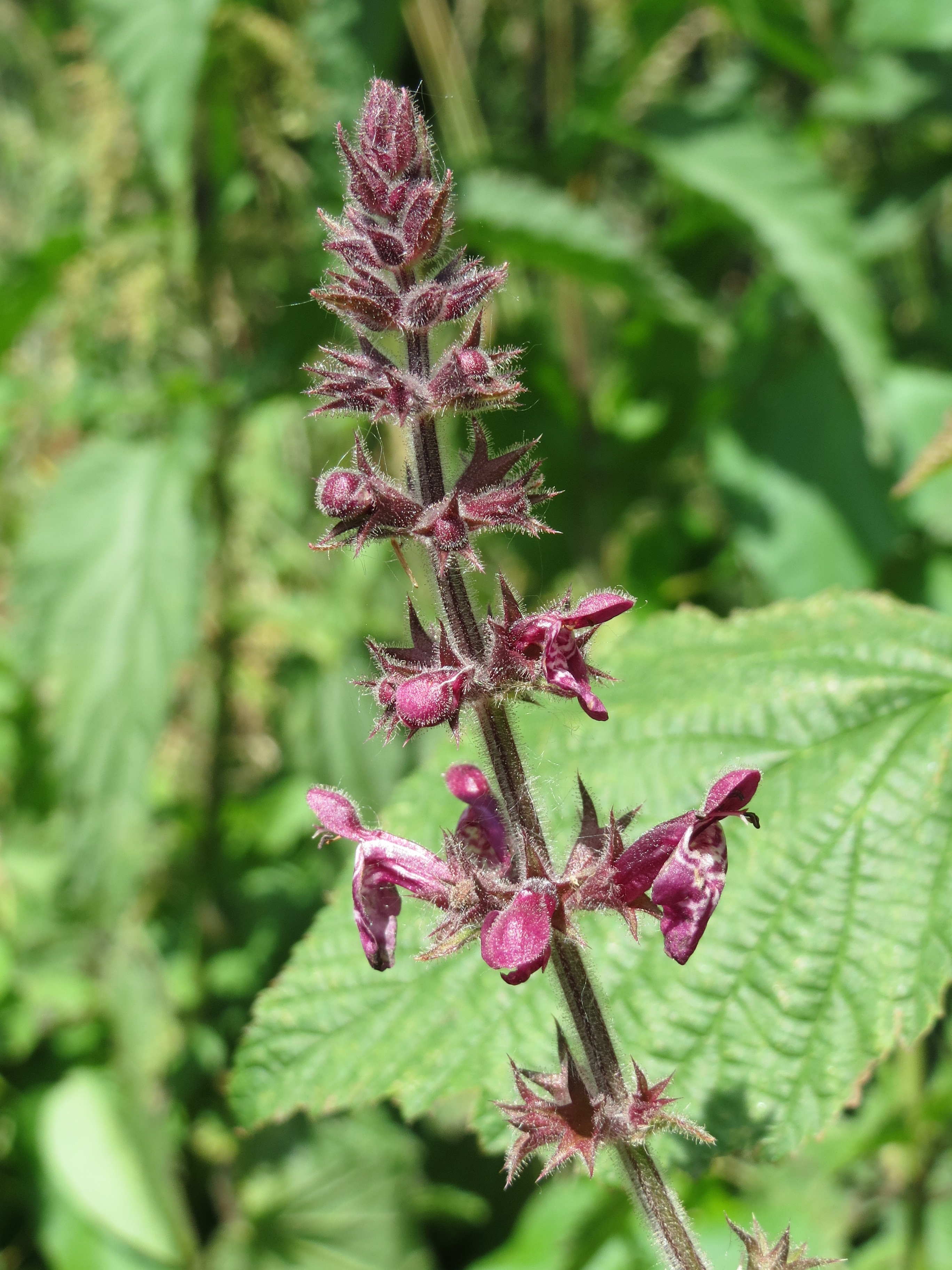 Wald-Ziest (Stachys sylvatica) im Naturschutzgebiet Ketscher Rheininsel